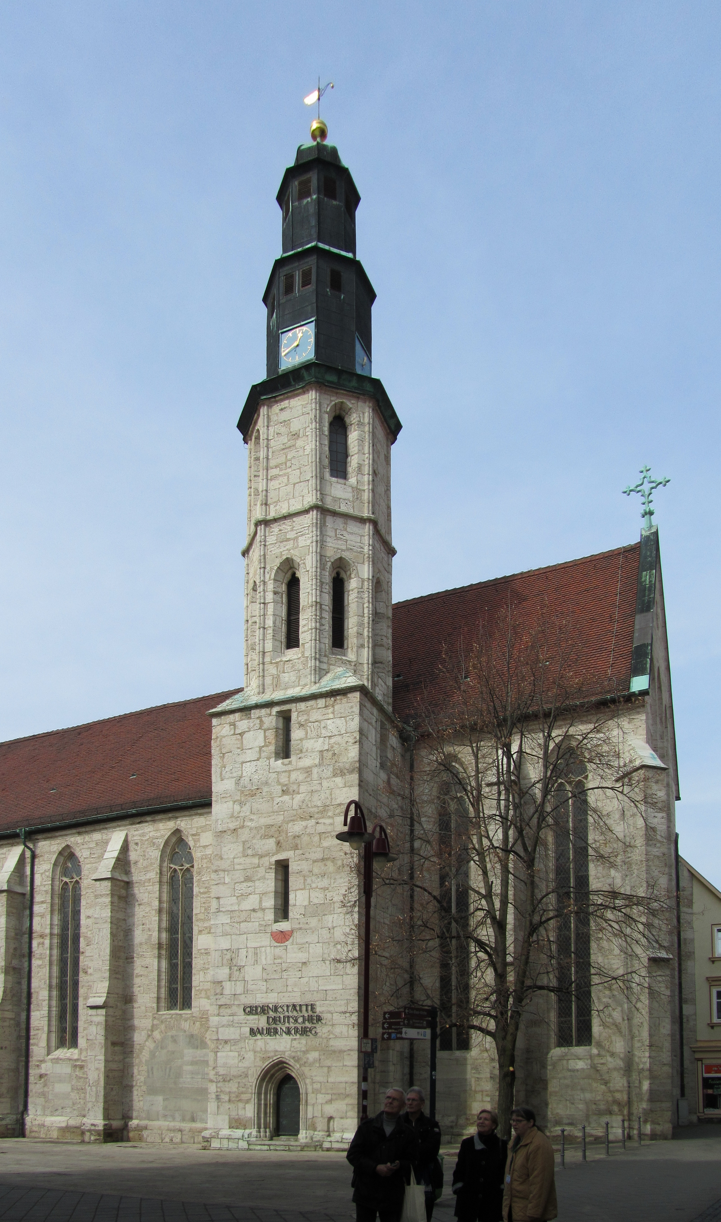 Der Turm der Kornmarktkirche in Mühlhausen (Thüringen).